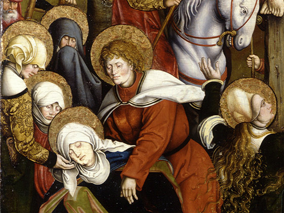 Kreuzigung Christi detail